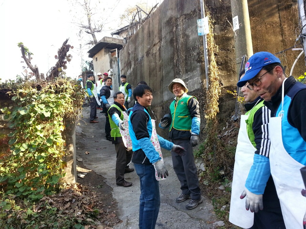 육군학사장교 연탄봉사